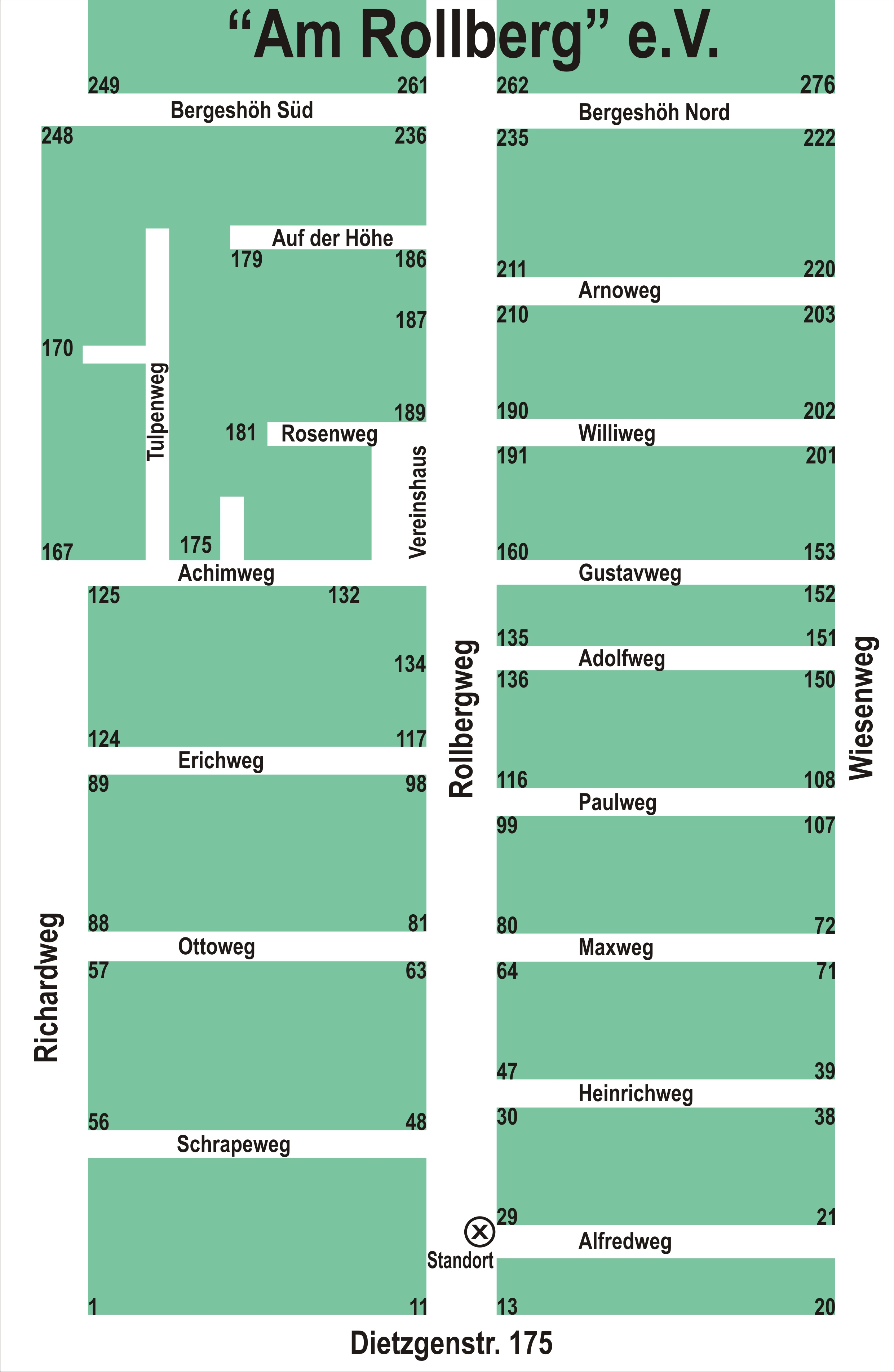 Wegweiser der alten Gartenwege in der Kleingartenanlage Am Rollberg, bevor diese Privatstraßen in Berlin-Rosenthal vom Bezirksamt gewidmet und (um)benannt wurden.